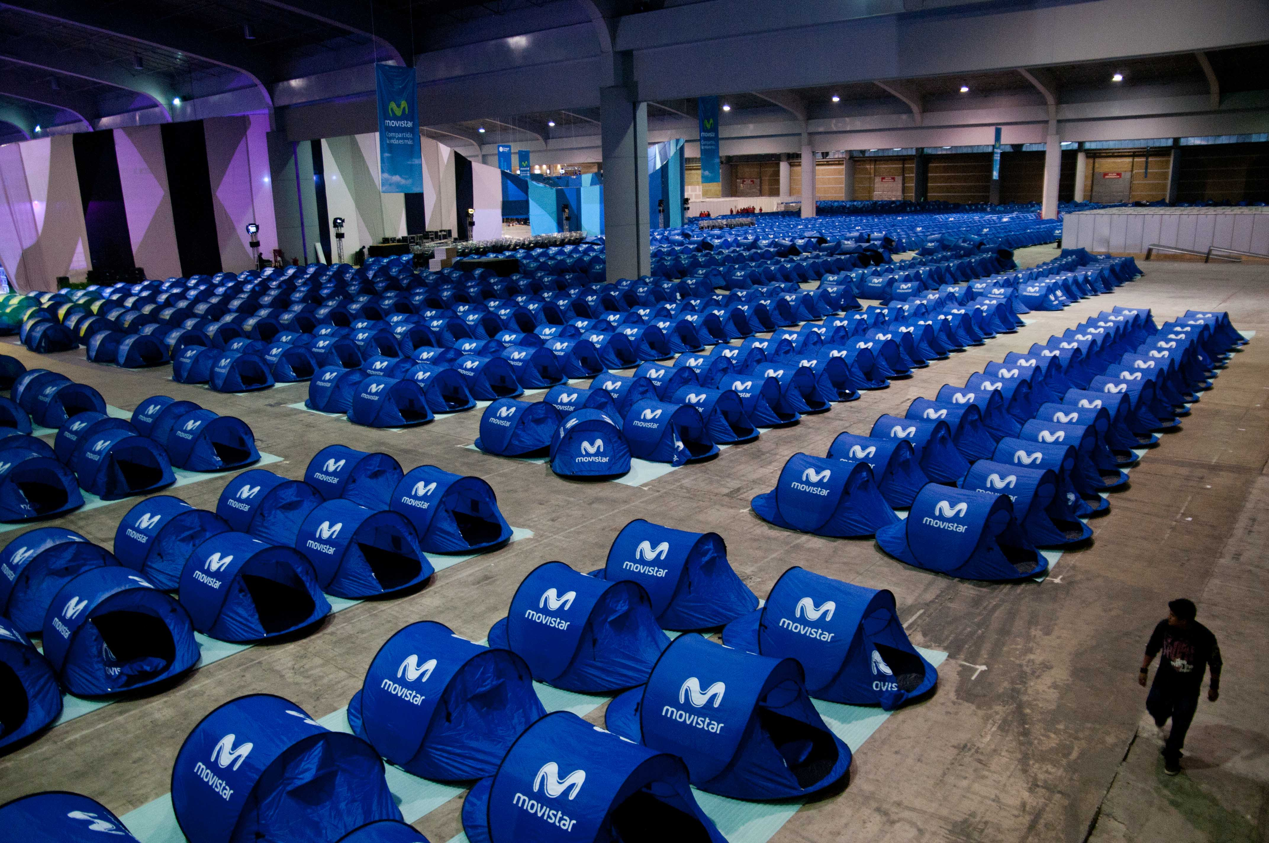 El próximo Lunes dará inicio la 3a edición de la Campus Party en el Distrito Federal. Este evento de tecnología, creatividad, ocio y cultura digital se realiza anualmente en 10 sedes alrededor de Iberoamérica y Estados Unidos. Las casas de campaña donde los "campuseros" acamparán durante la semana